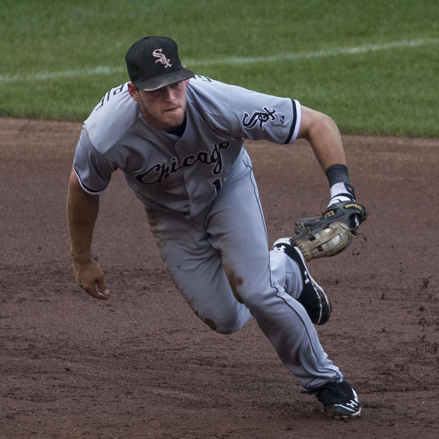 Conor Gillaspie